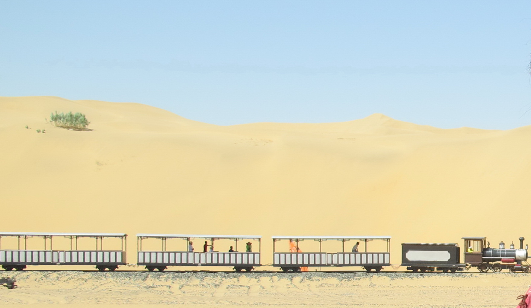 内蒙古-响沙湾景区 小火车